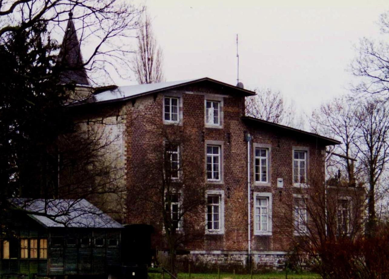 Kasteel Oost te Oost-Maarland.